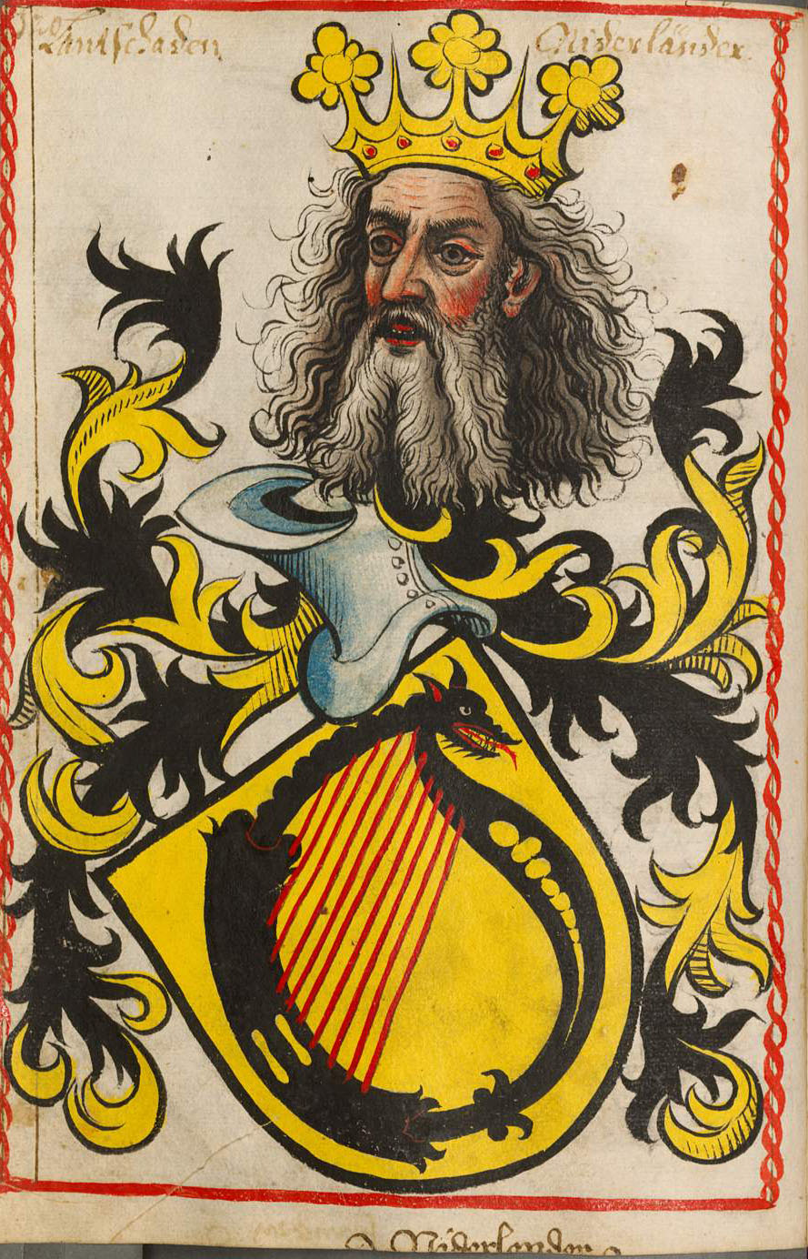 Scheibler'sches Wappenbuch , älterer Teil "Nieferländer" Landschaden